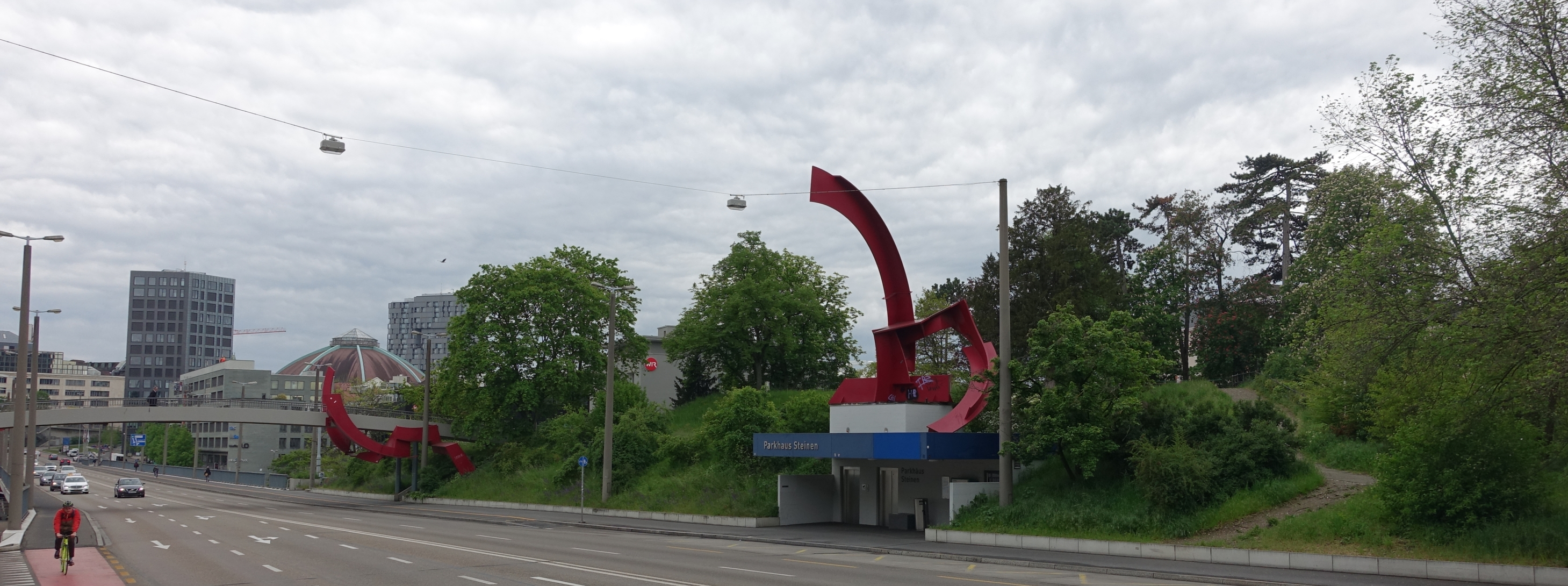 Paul Suter (1926-2009) Bildhauer, Plastiker, 1971-74, Drei Monumentalskulpturen,Steinenschanze, Basel